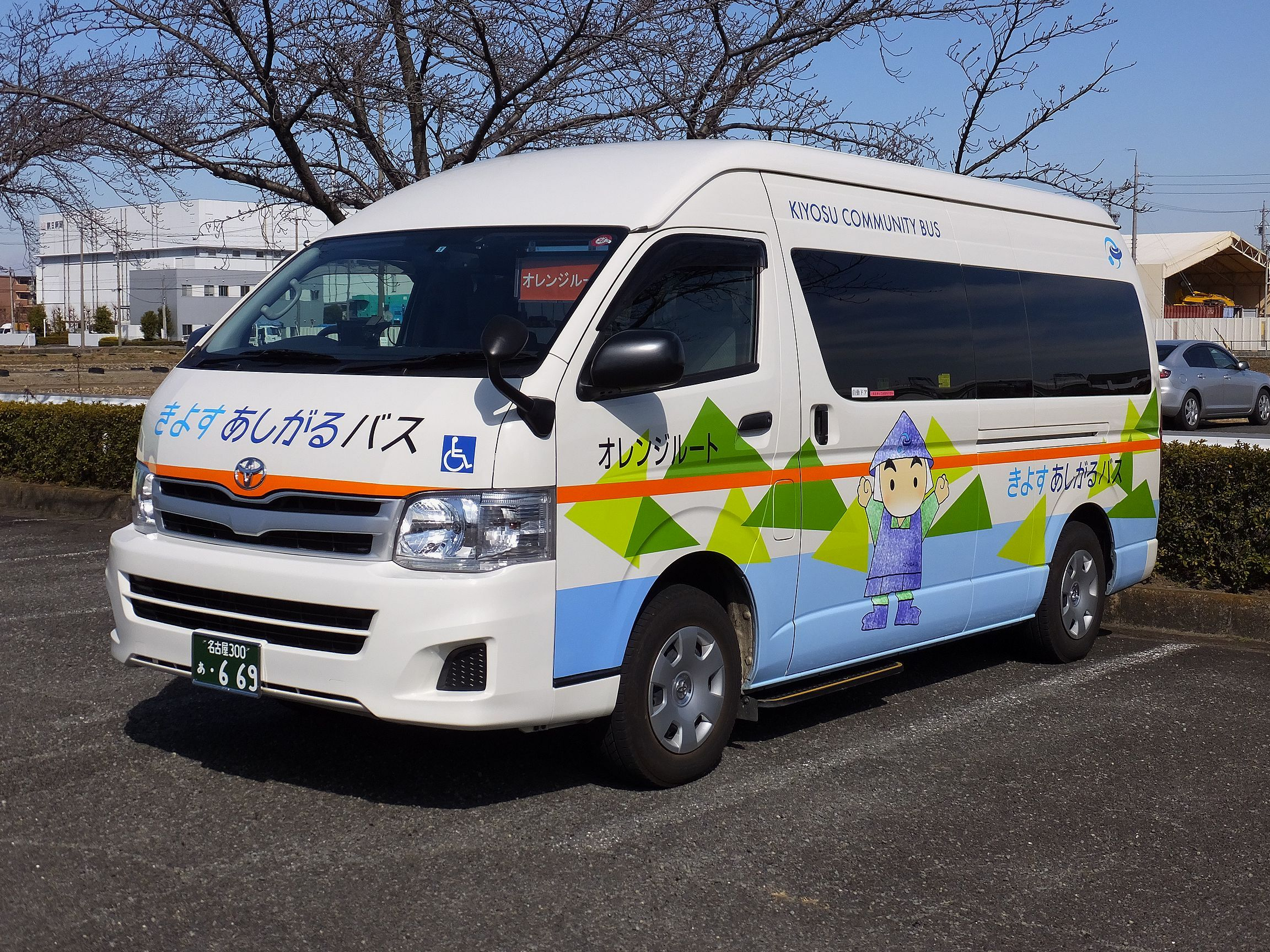 定員8名 リフト付